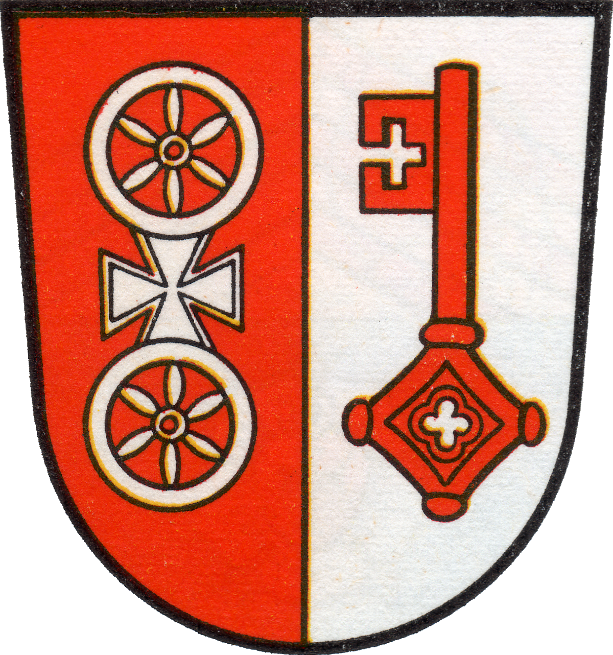 Wappen von Eltville am Rhein